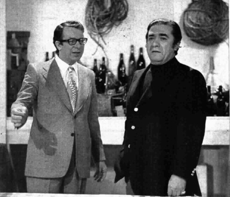 Luigi Veronelli and Giuseppe Di Stefano